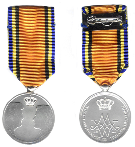 Herinneringsmedialle ter gelegenheid van het huwelijk van prins Willem Alexander en prinses Maxima Categorie:Wikipedia:Afbeeldingen/Gebruiker:Luijt